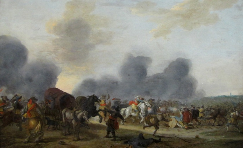 Angriff kaiserlicher Dragoner auf feindliches Fußvolk, Ölgemälde im Heeresgeschichtlichen Museum in Wien.